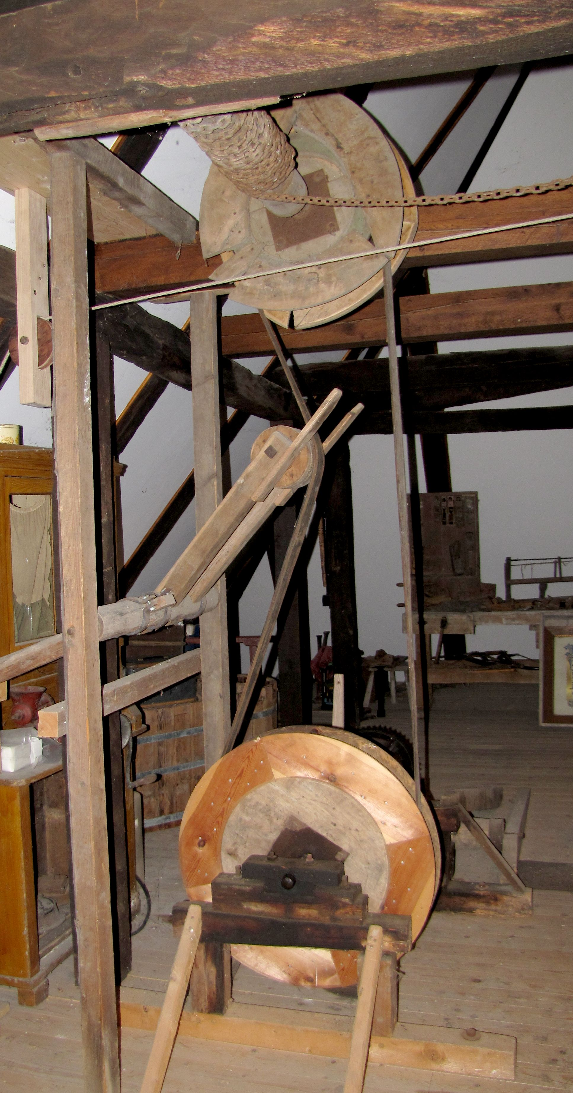 Riemenantrieb des Lastenaufzugs. Die Andrückrolle zum Spannen es Transmissionsriemens dient als Kupplung (Mitte). Wickelwelle für Lastenkette (oben).